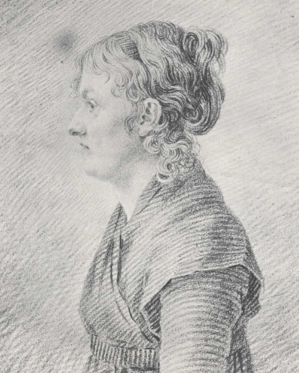 Katharina Dorothea Friedrich (1766–1808), Schwester von Caspar David Friedrich (Hinz 72)